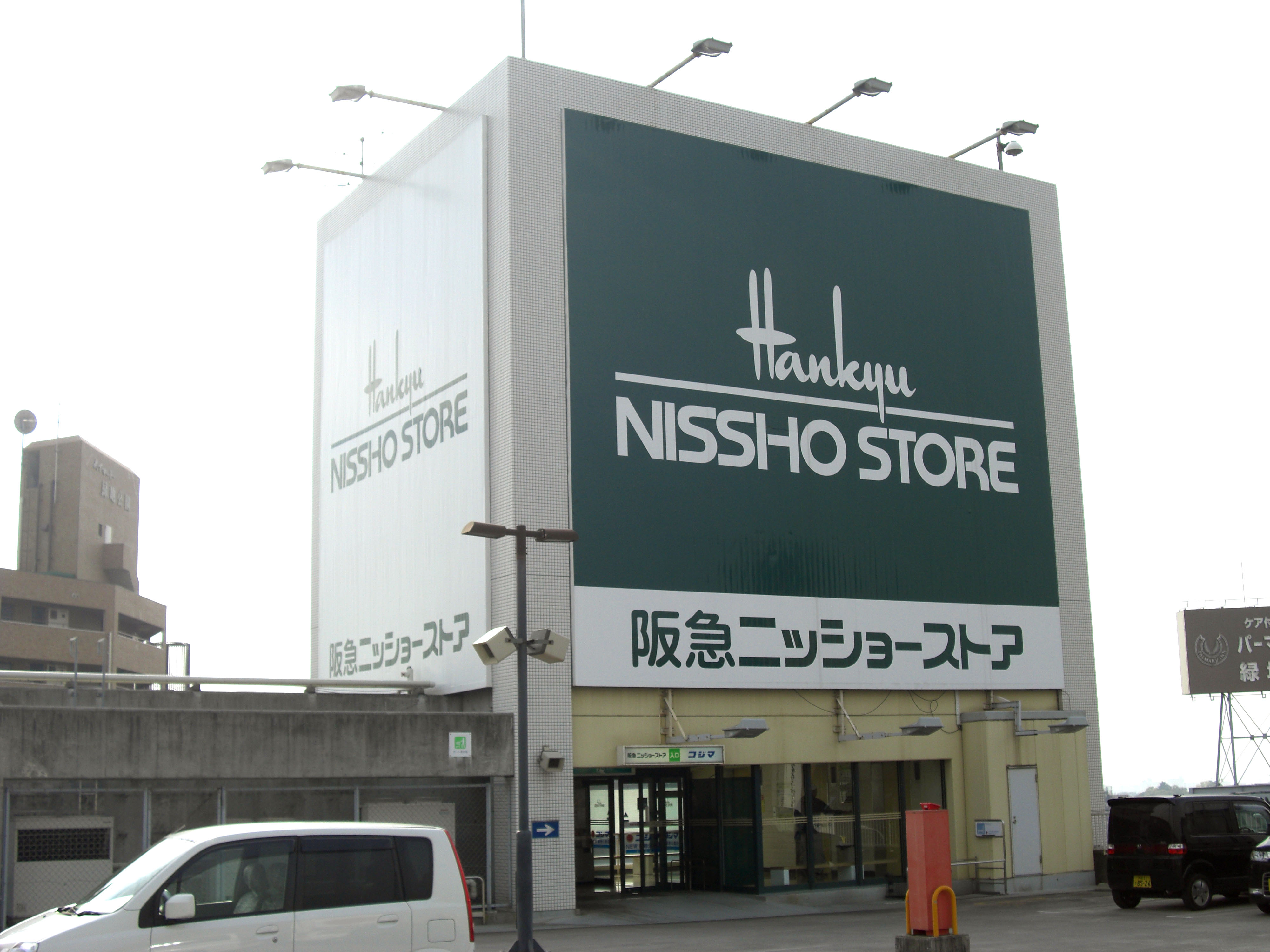 Hankyu NISSHO STORE Ryokuchi-Koen,Senriyama Suita-City Osaka Japan.